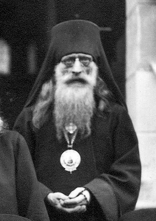 епископ Серафим (Ляде) на Архиерейском соборе РПЦЗ 1934 года в Сремских Карловцах